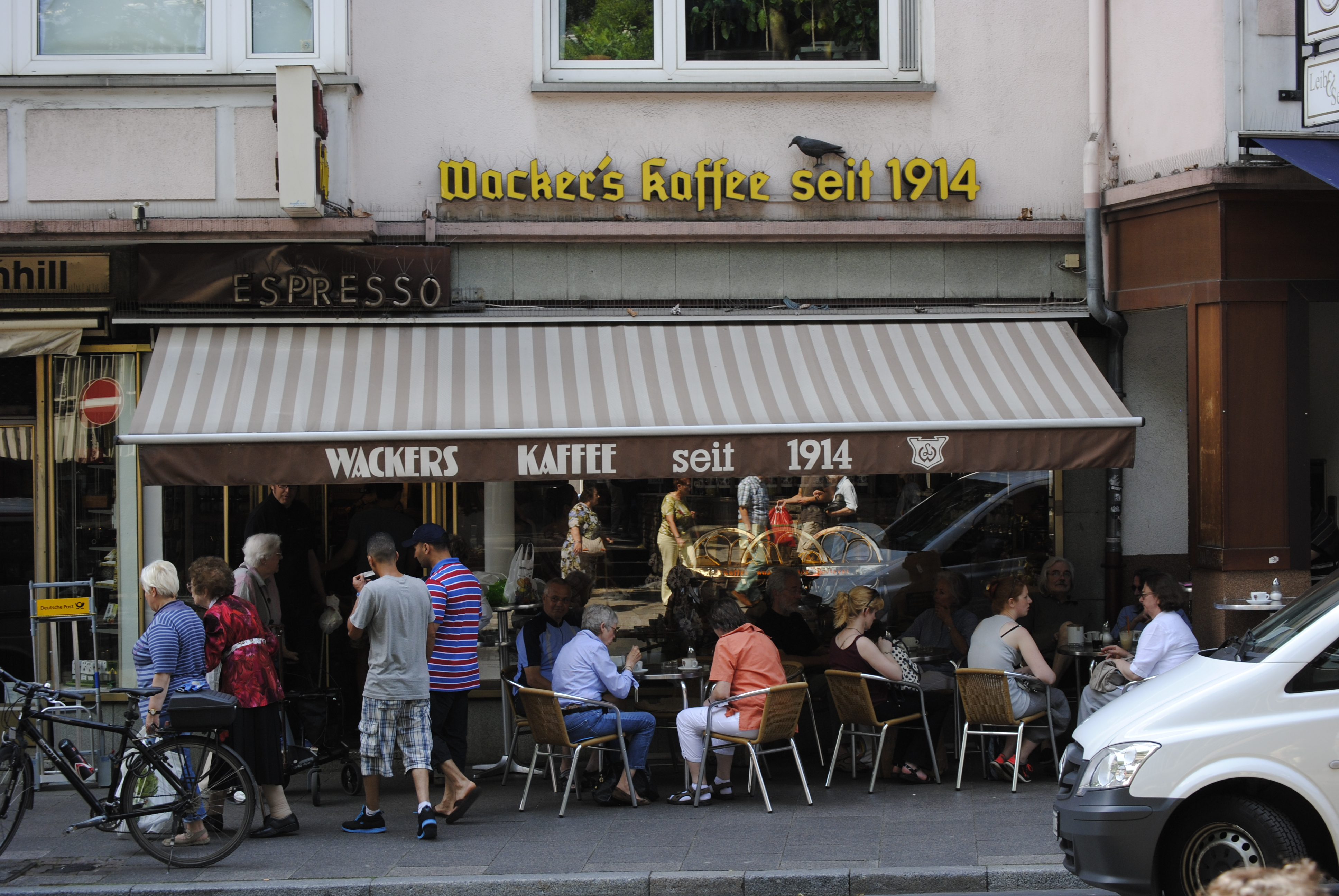 Das Café Wacker am Kornmarkt in Frankfurt